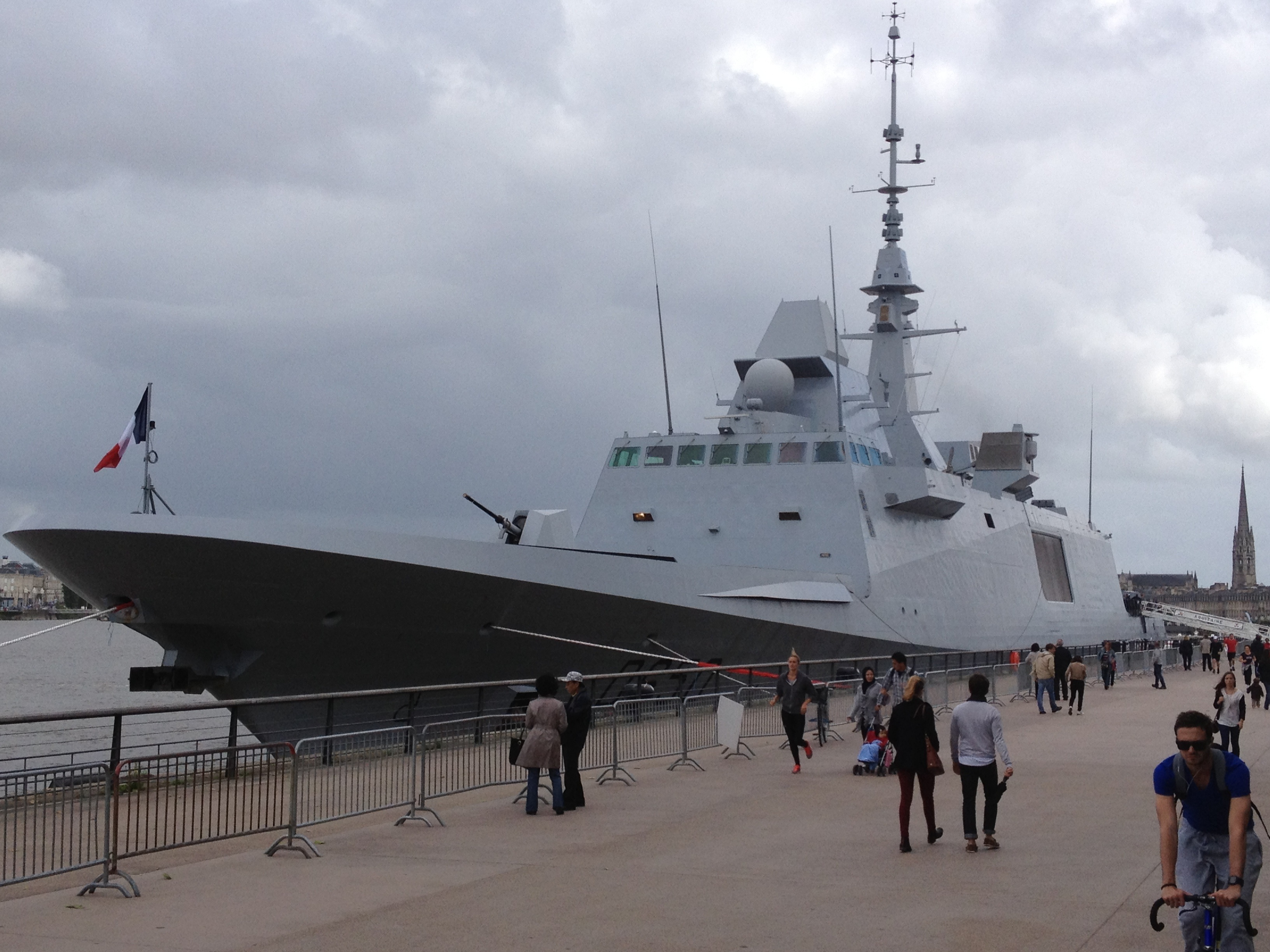 Frégate Aquitaine à quai à Bordeaux